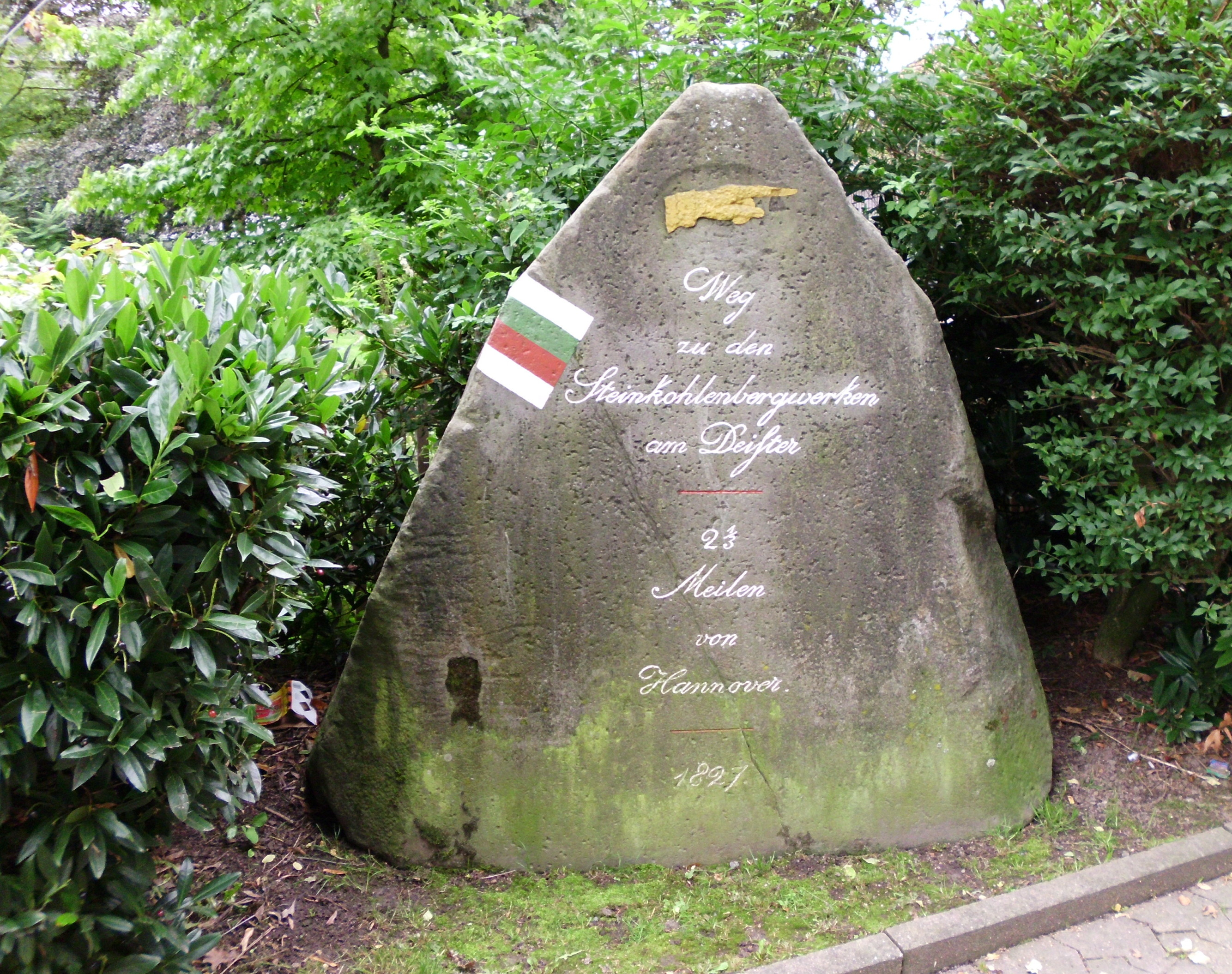 Der Dicke Stein befindet sich in 30974 Wennigsen, Hülsebrinkstraße 1 und erinnert an den Kohleabbau im Deister.